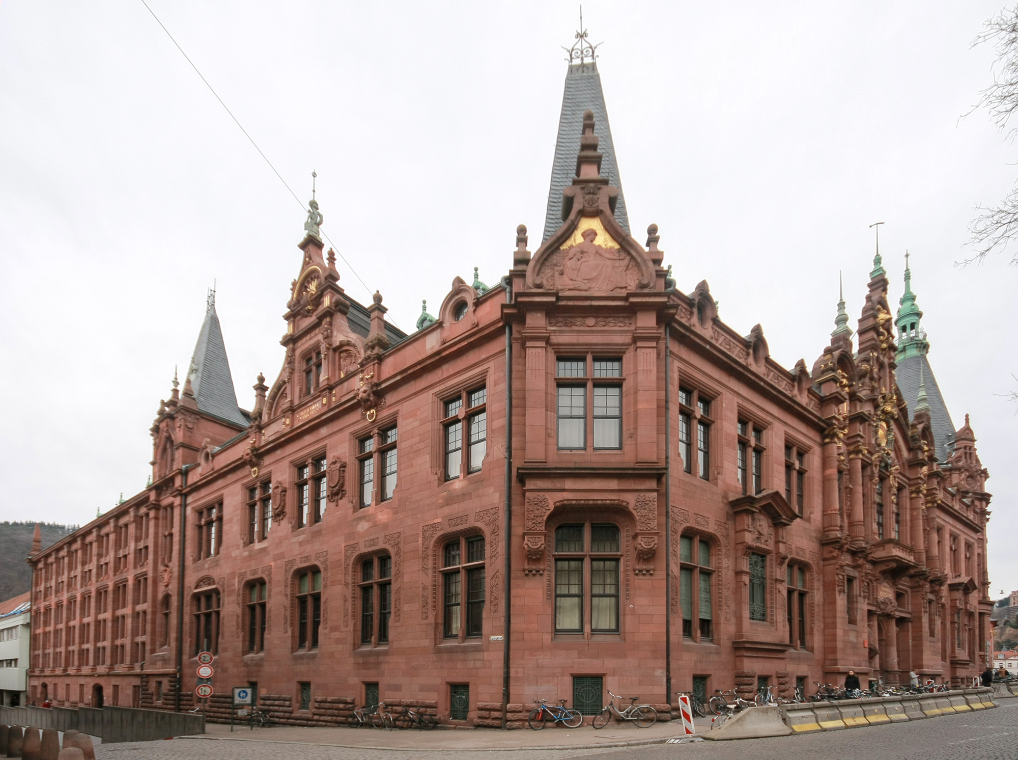 Südwest-Fassade der Universitätsbibliothek Heidelberg